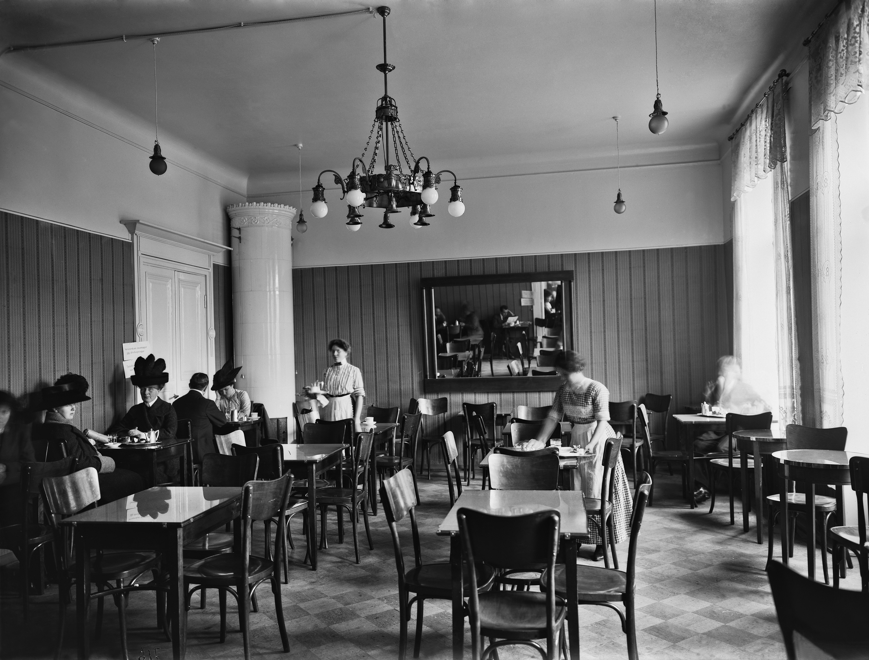 Ekbergin kahvila, Aleksanterinkatu 52.; negatiivi ja vedos, lasi paperi pahvi, mv